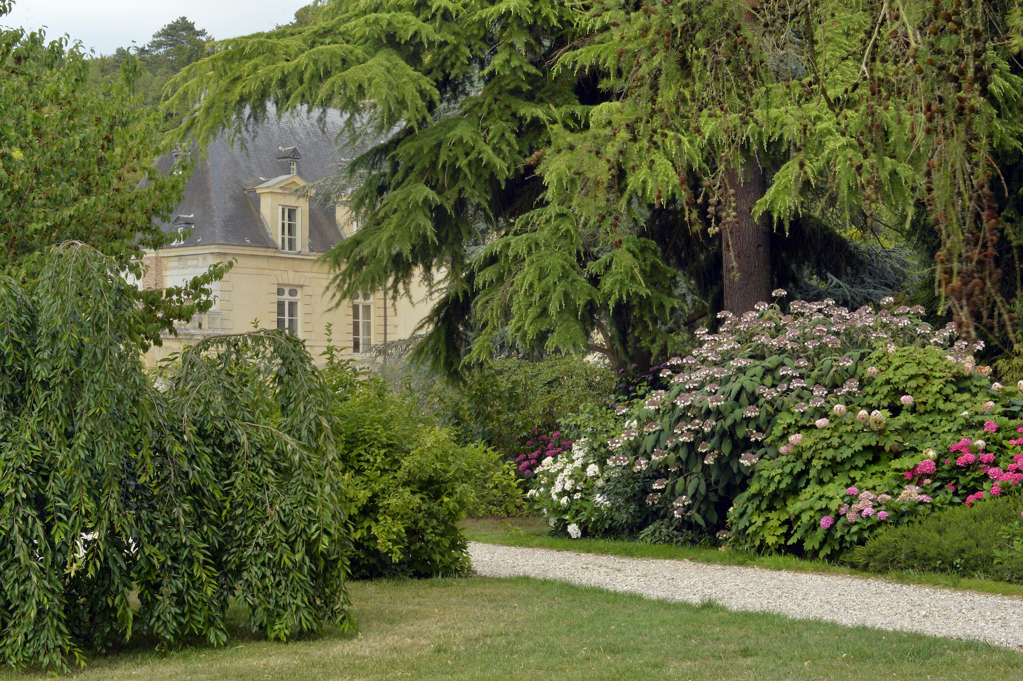 En ce lieu pittoresque, véritable havre de paix, d’harmonie et d’équilibre où règne une étonnante diversité, la nature a trouvé le parfait terrain de son expression